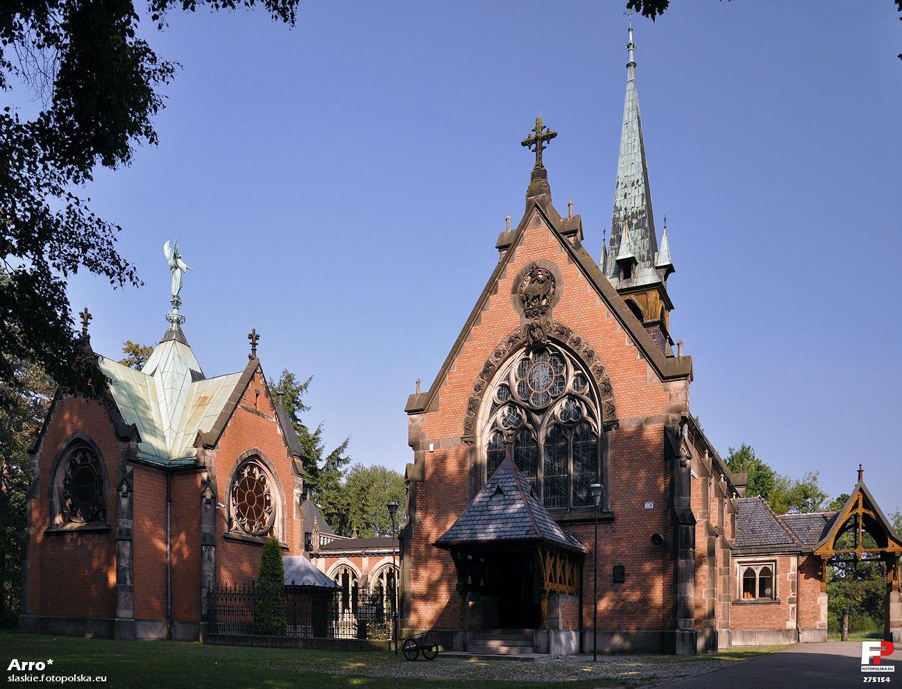 Kościół Dobrego Pasterza w Świerklańcu. Budynek po lewej stronie to kaplica grobowa, w której został pochowany m. in. Guido Henckel von Donnersmarck